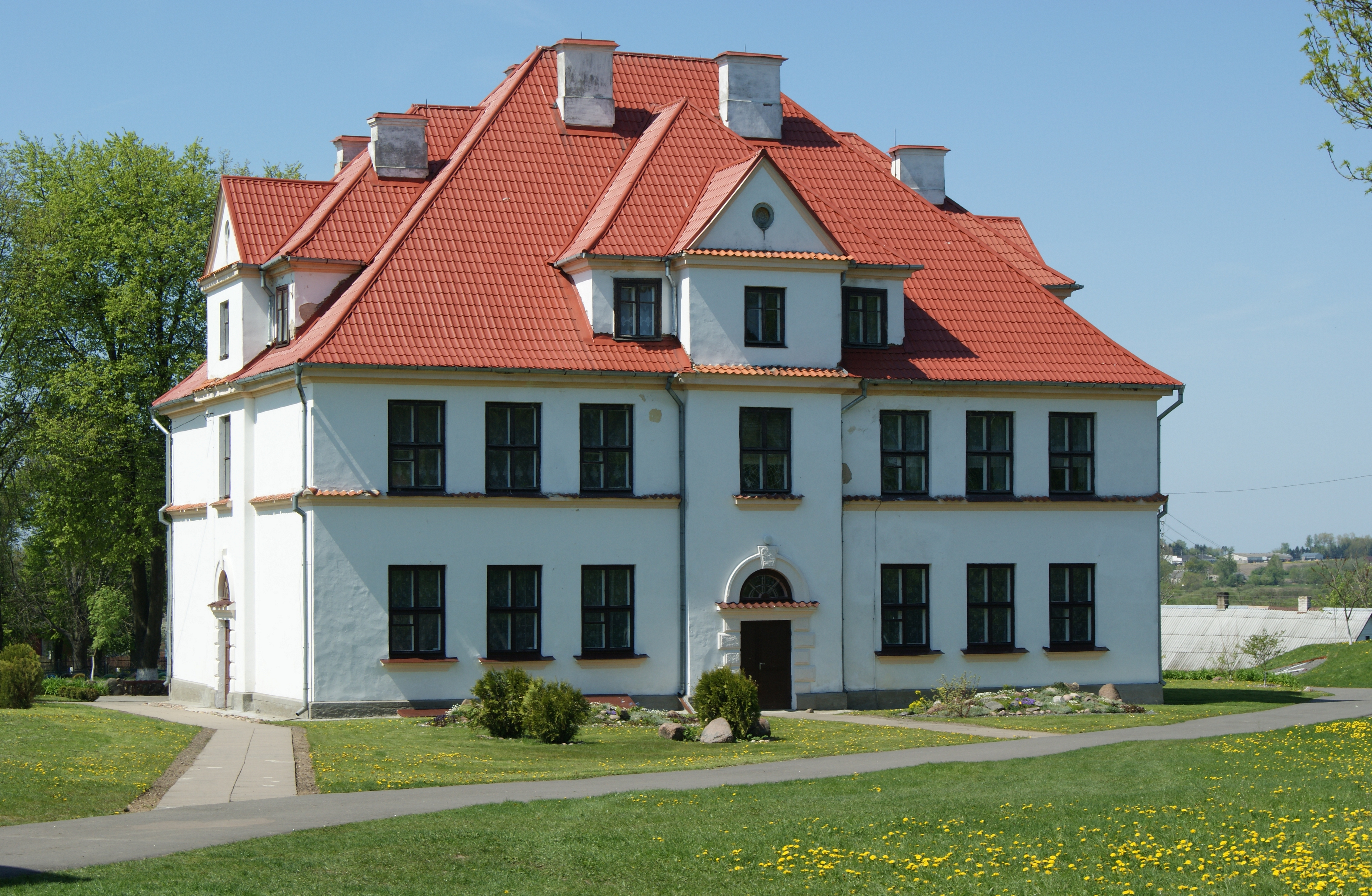 Беларуская (тарашкевіца): Будынак былой польскай школы. г. Камянец This is a photo of Belarusian heritage monument. Reference number: 113Г000322 ( WLM)